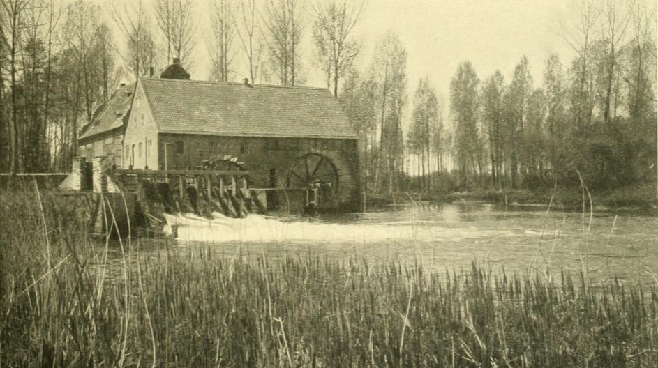 Photo der Gustorfer Mühle an der Erft bei Gustorf vor dem Umbau von 1913. Aus: Richard Klapheck, Kunst-Verein für die Rheinlande und Westfalen (Hrsg.): Die Baukunst am Nieder-Rhein. Band 1, Bagel, Düsseldorf 1916